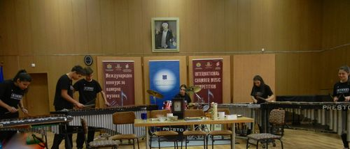 Ансамбъл ударни инструменти „ПРЕСТО“